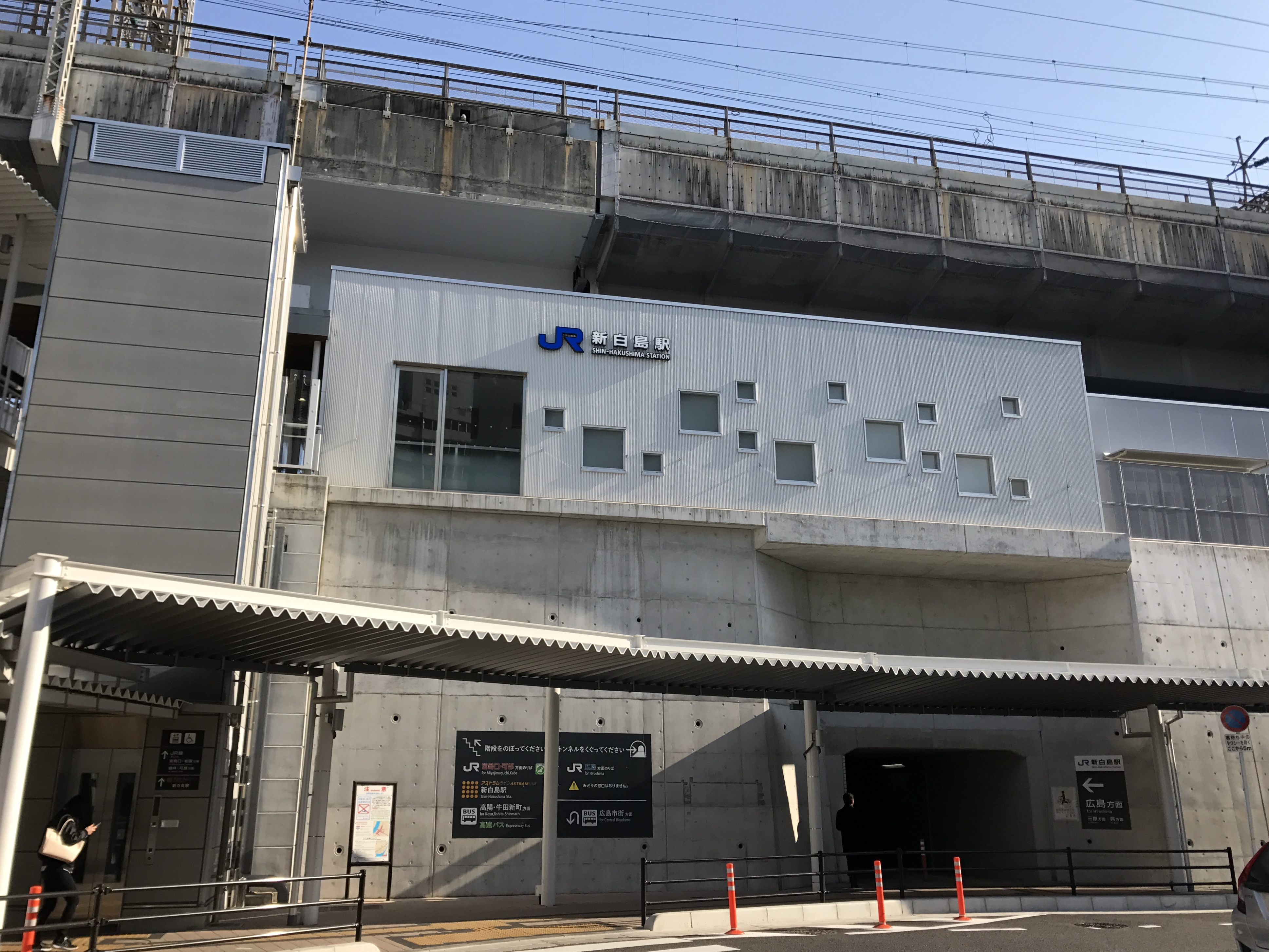 新白島駅(山陽本線)の駅舎